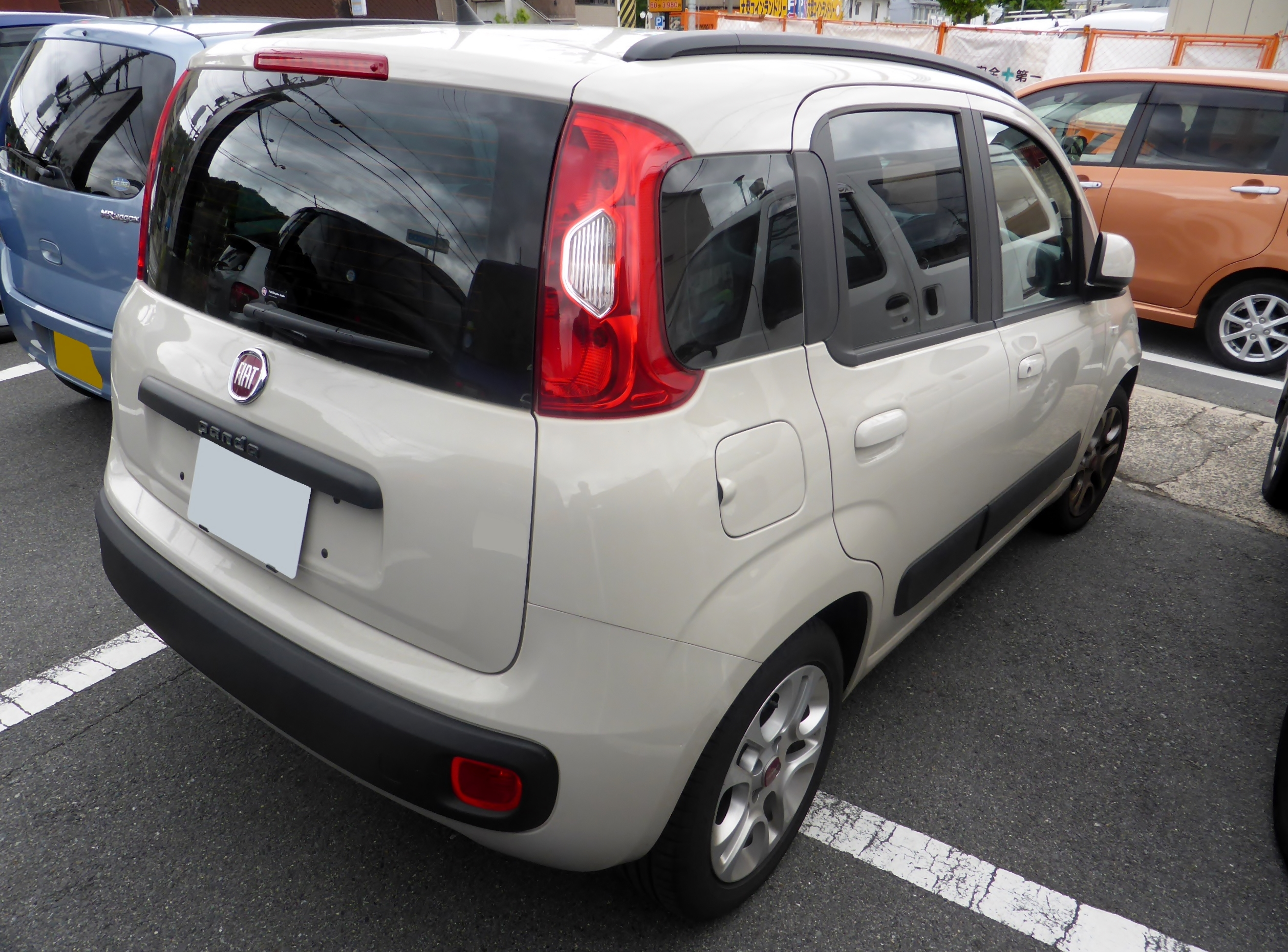 3代目フィアット・パンダをリアから撮影。